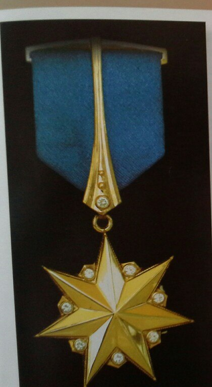 Қазақша (кирил): "Халық Қаһараманы" ордені